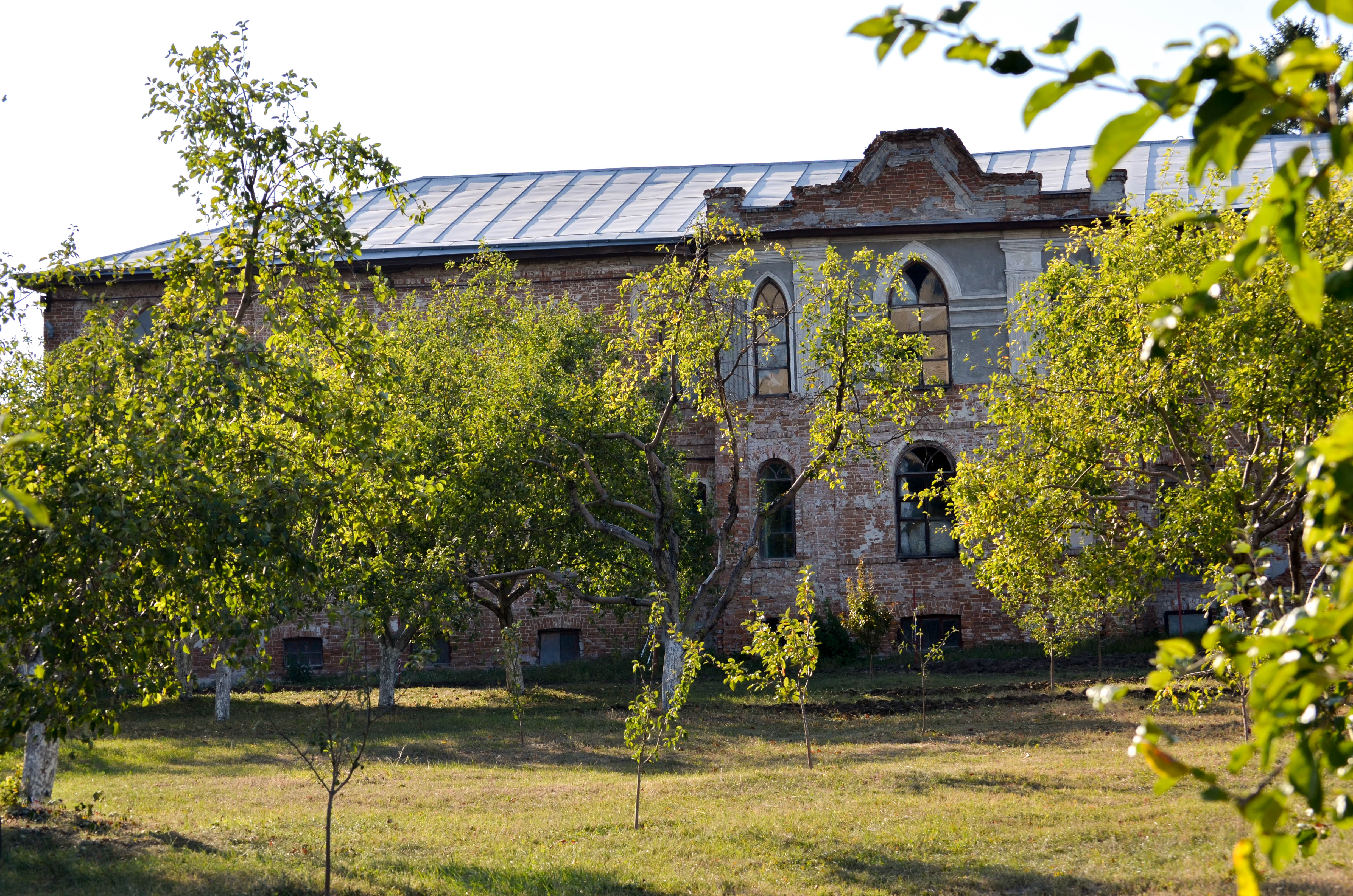 Хорошевський монастир (сучасне використання — будинок престарілих), Хорошеве